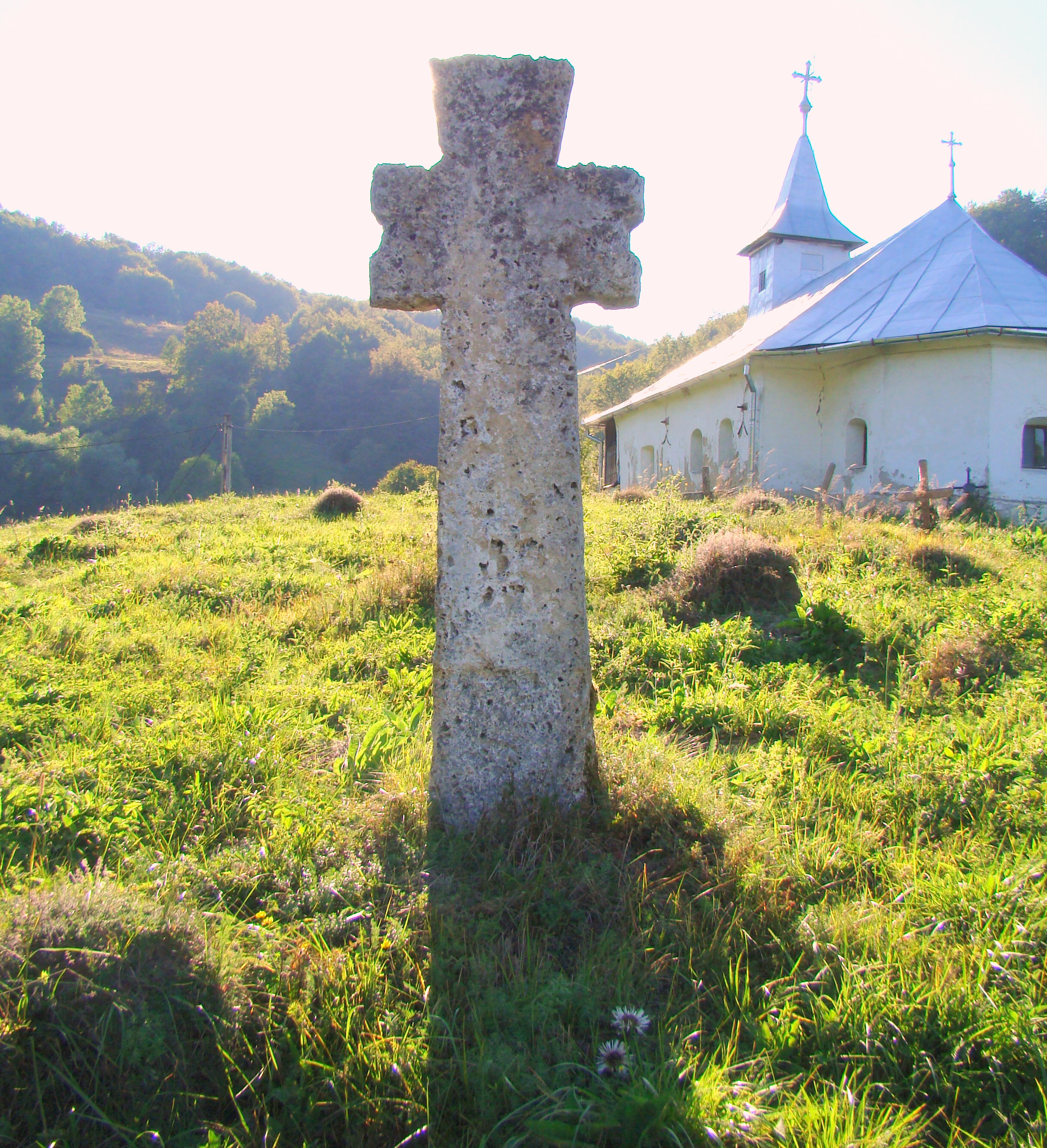 Biserica „Sf. Dumitru”, sat Poieni; comuna Vidra